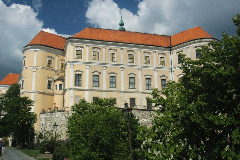 Mikulovský zámek